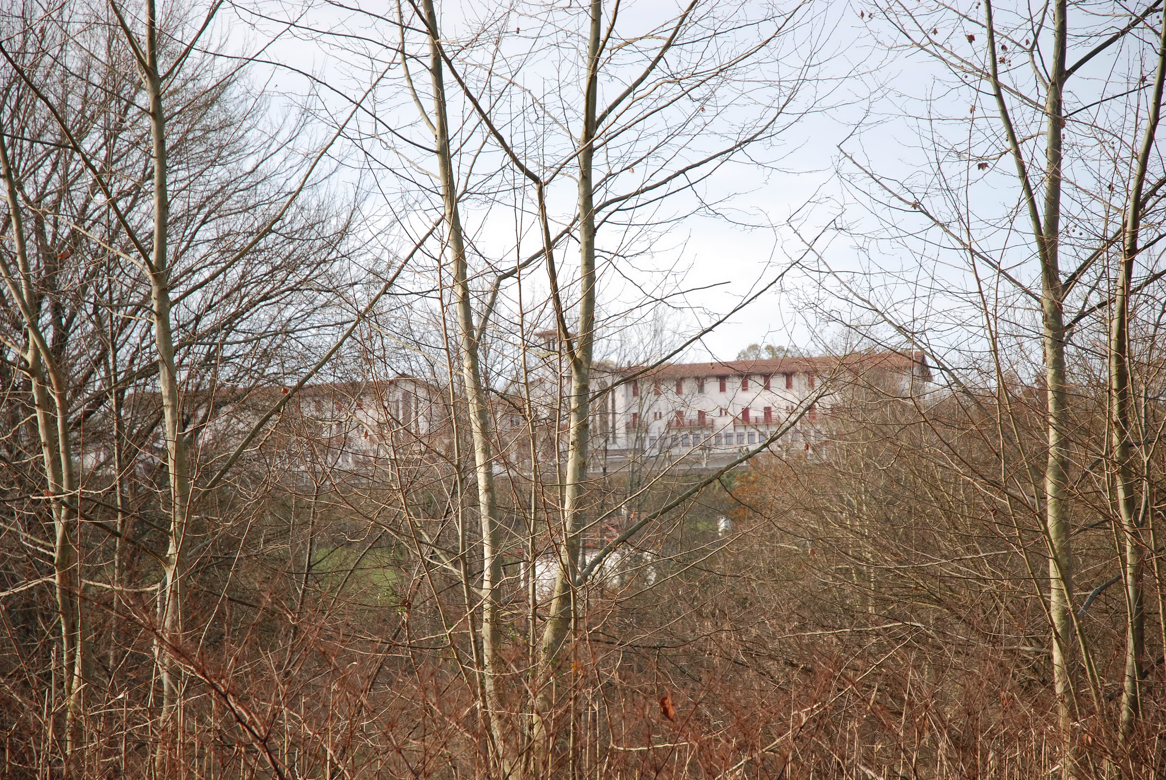 Ustaritz, ancien petit séminaire, aujourd'hui college Saint François Xavier. Photo prise le 31/12/06 par Harrieta171